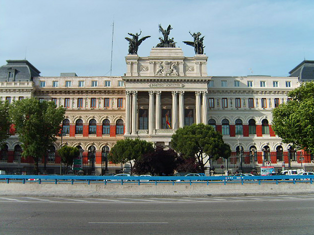 Fachada del Miniterio de Agricultura de España